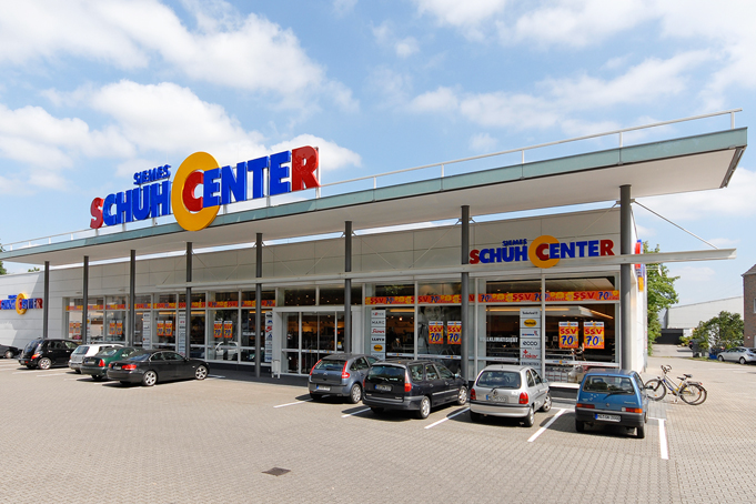 Siemes Schuhcenter, eine Filiale der Siemes Gruppe.